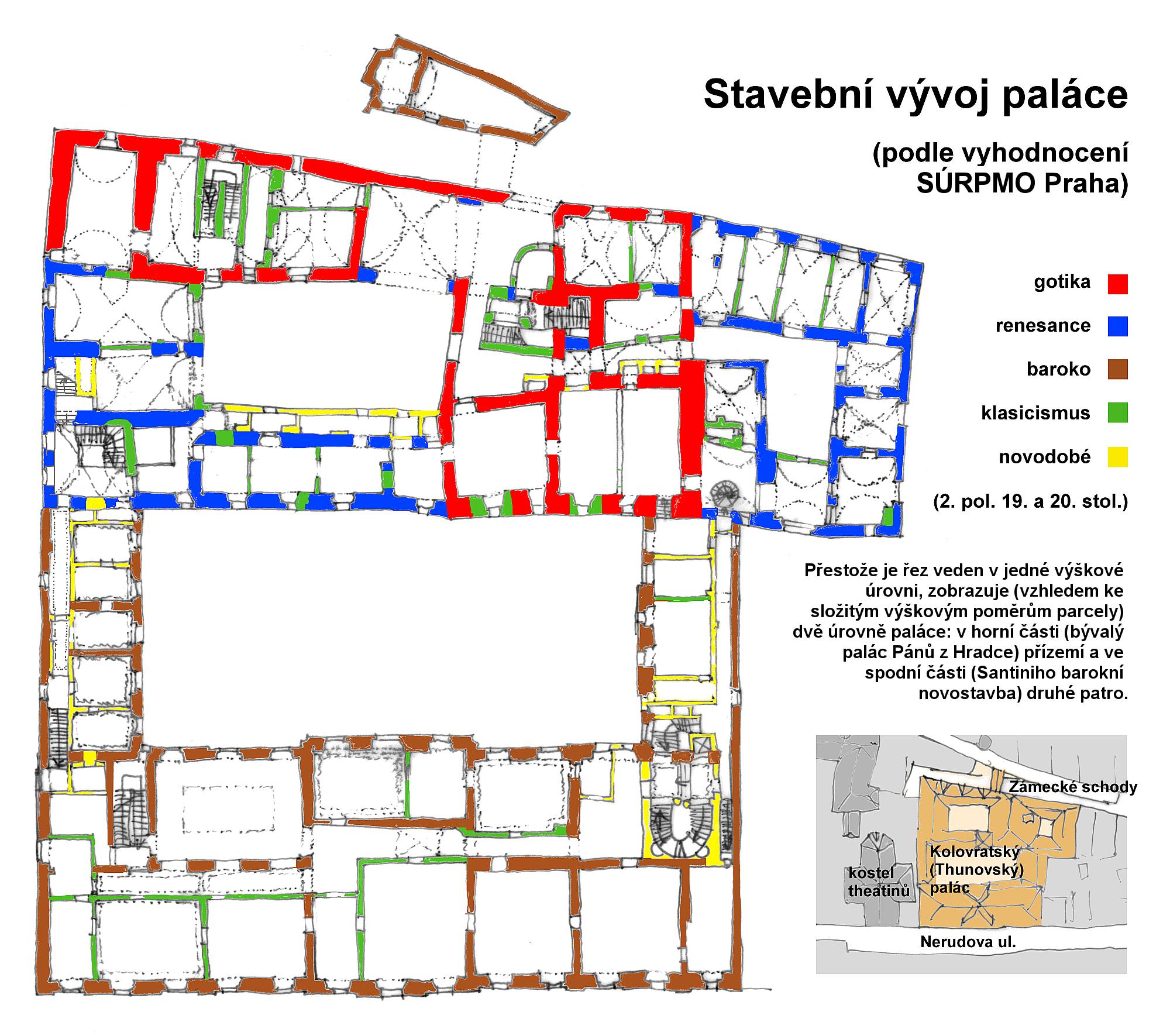 půdorys druhého patra Kolovratského (Thunovského) paláce v Praze na Malé straně